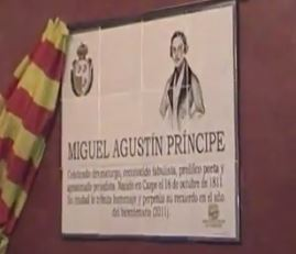 Placa conmemorativa del II Centenario de su nacimiento